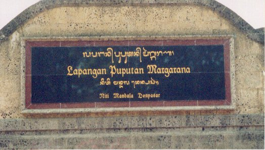 Ik (Meursault2004 15 feb 2006 23:26 (CET)) heb deze afbeelding zelf gemaakt rond Kerst oftewel 25 december 2000 in Denpasar, Bali, Indonesië.